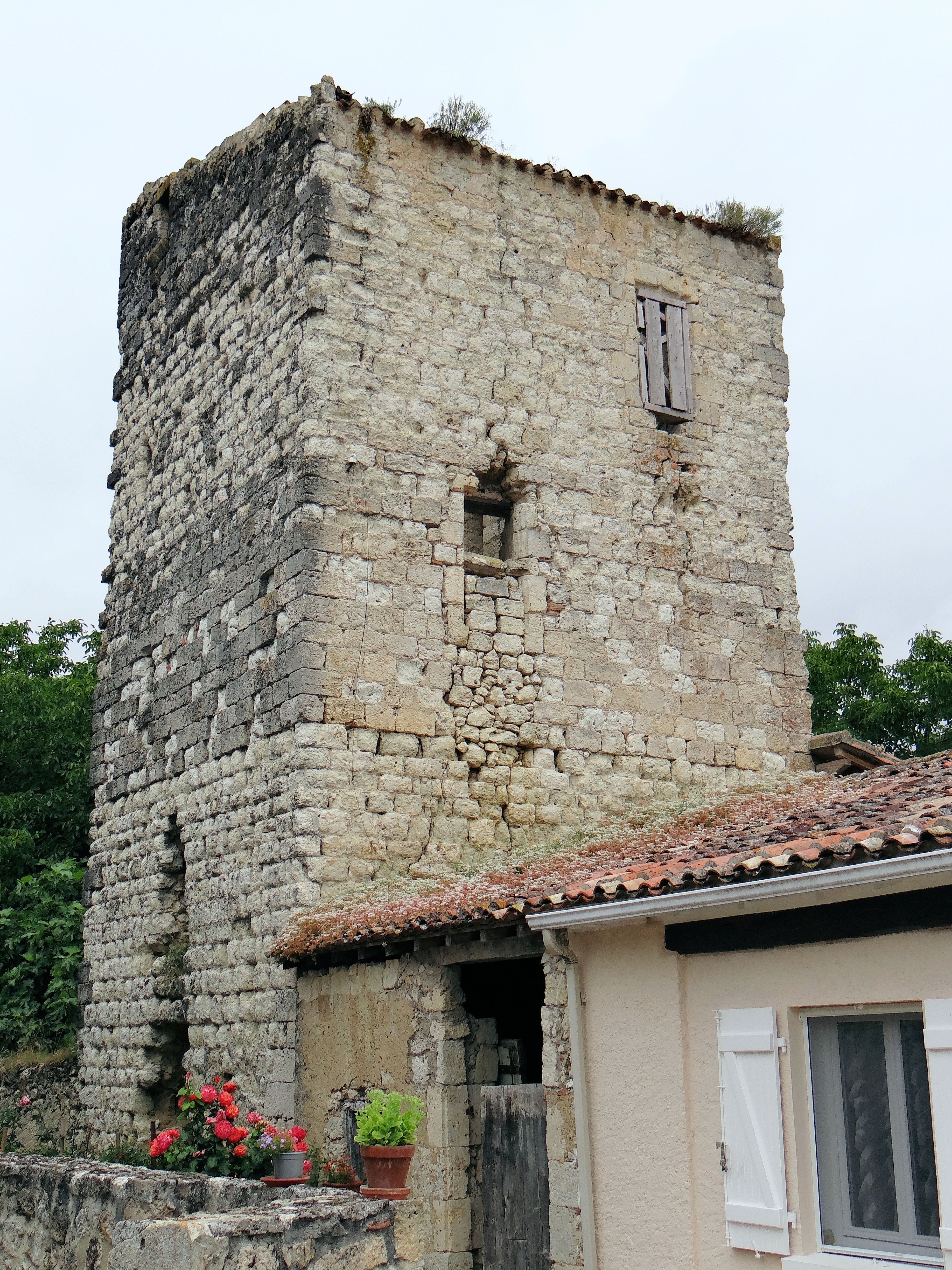 L'Isle-Bouzon - Ancien château - Vestige d'une tour